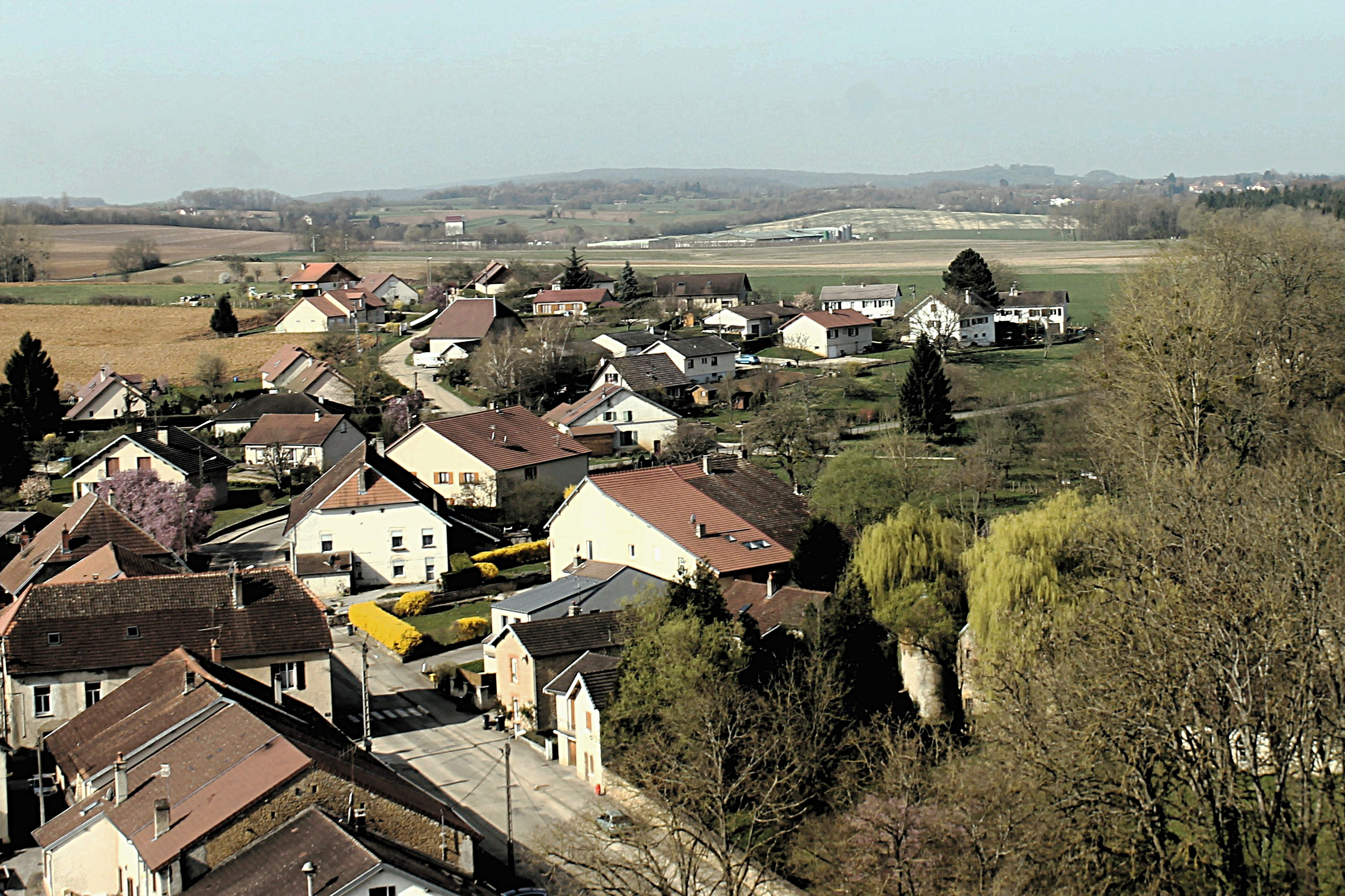 Vue partielle du village de Noironte depuis le clocher de l'église, en direction de l'ouest. A droite de l'image, le parc du château ; au centre et à gauche, la Grande Rue ; au second plan le lotissement du Rafou ; à l'arrière-plan , la fromagerie.